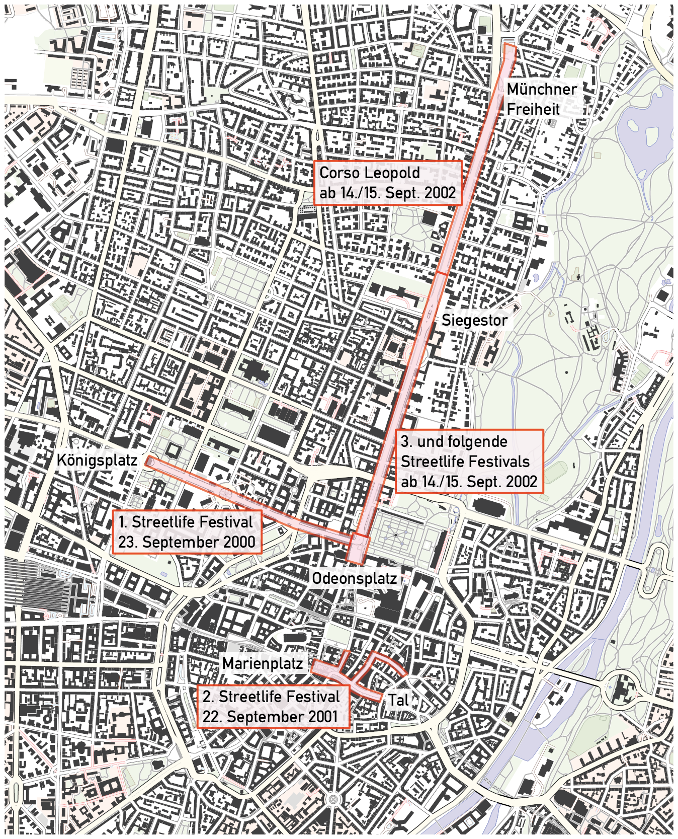 Karte der Streetlife-Festivals und des Corso Leopold in München